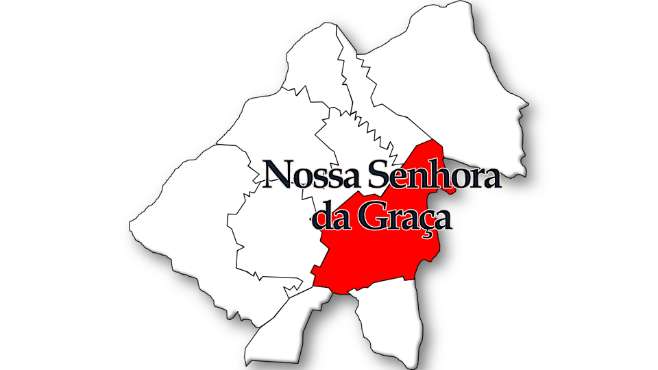 Evolução da População